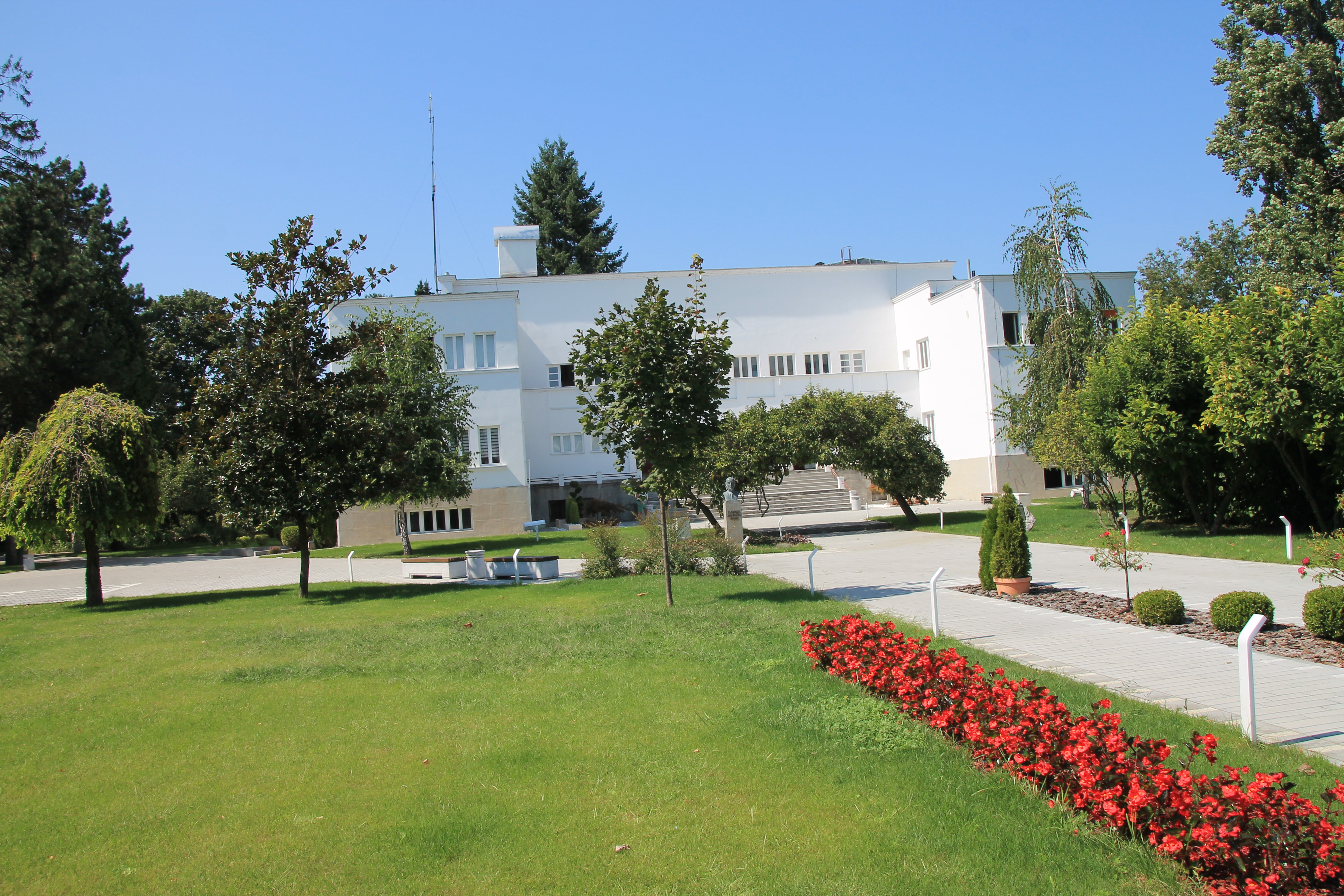 Centar za voćarstvo i vinogradarstvo